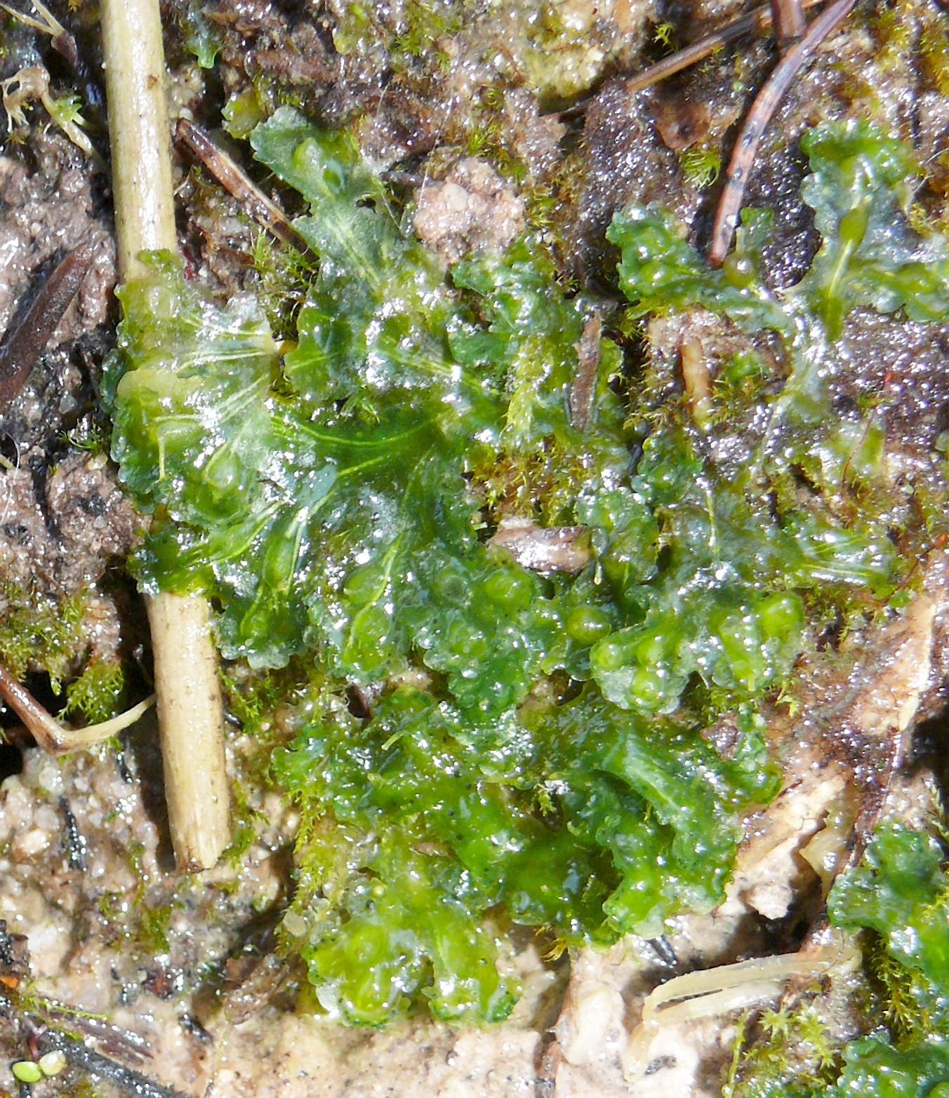 Blasia pusilla, Schwäbisch-Fränkische Waldberge, Germany